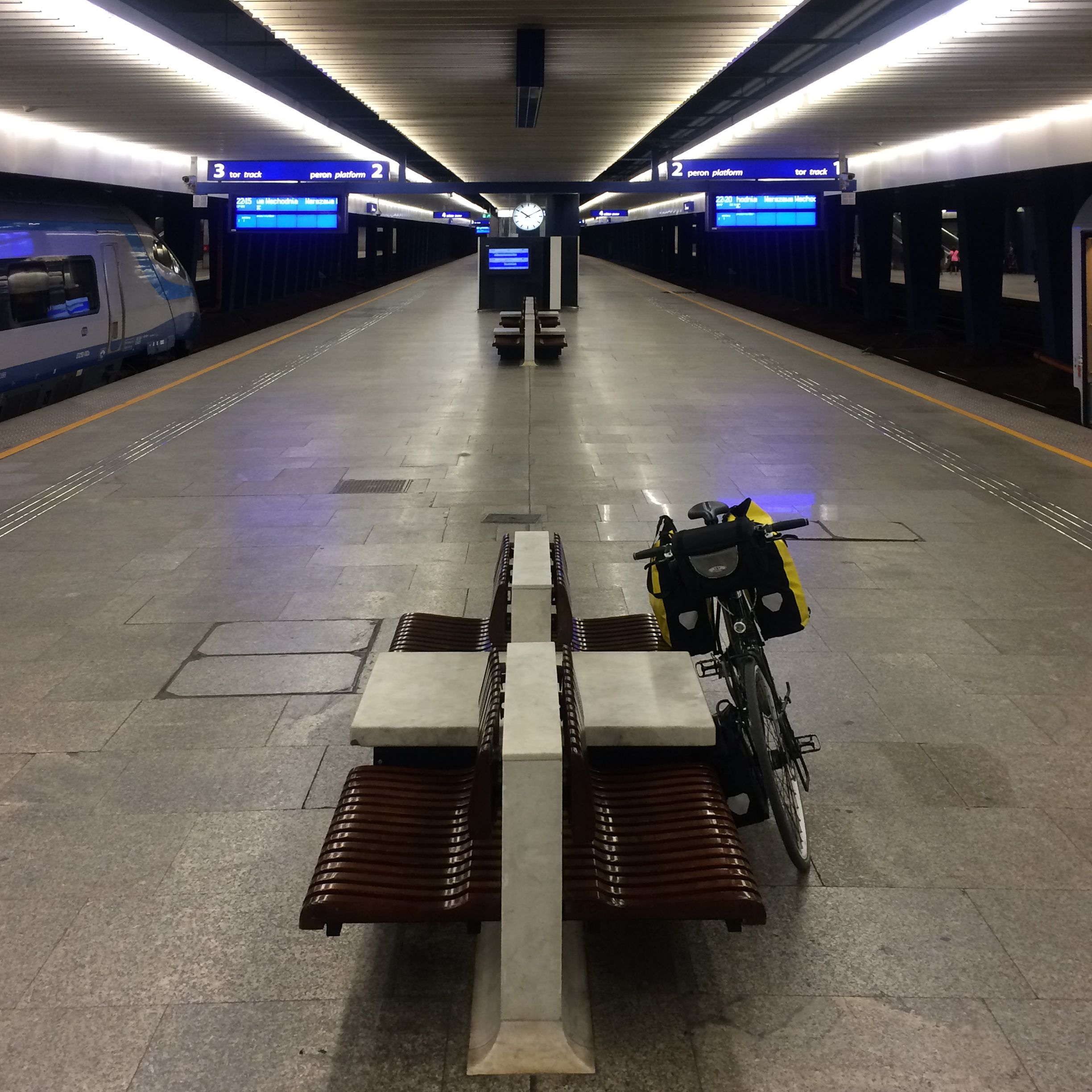 Bahnsteig 2 des unterirdischen Zentralbahnhofs in Warschau mit Pendolino (links) und Berlin-Warszawa-Express (rechts).